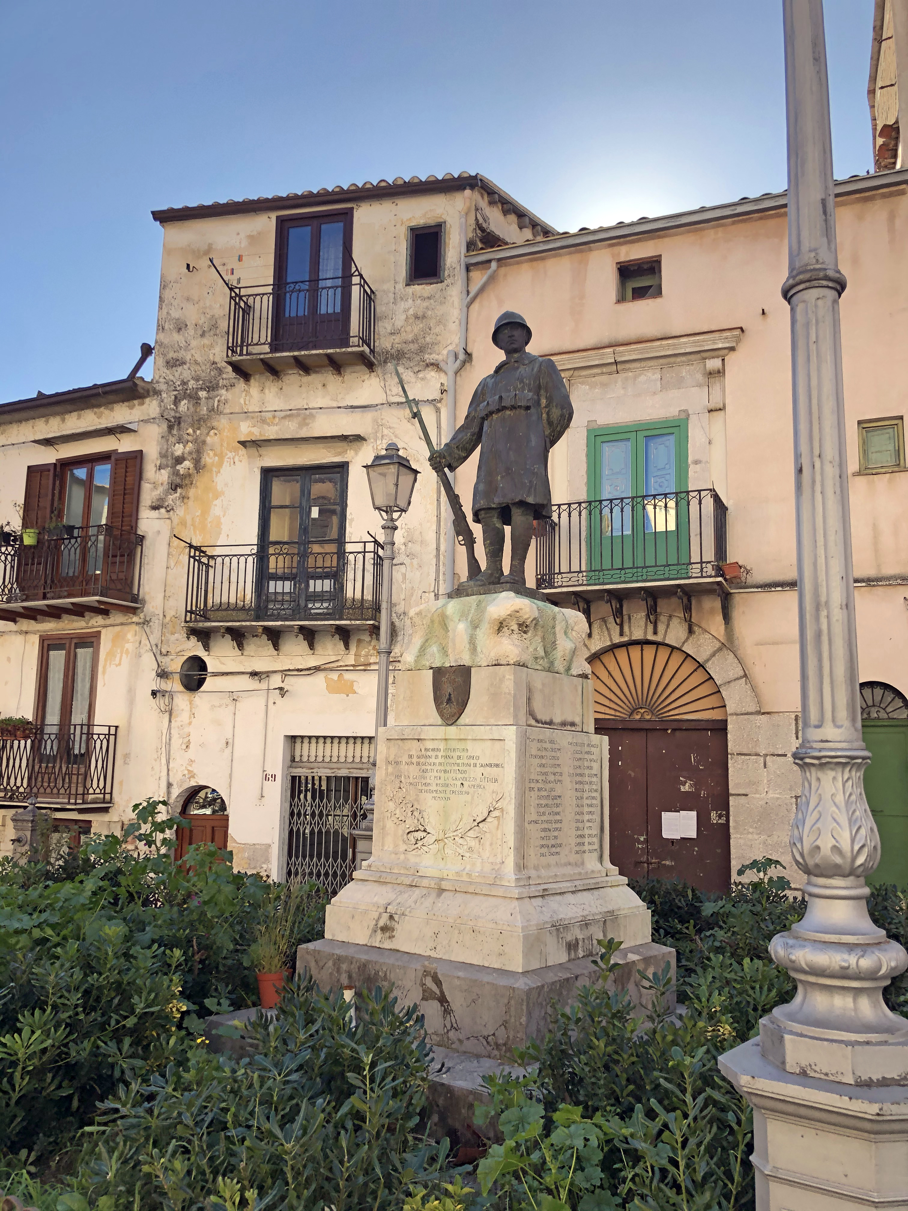 Monumento Piana degli Albanesi